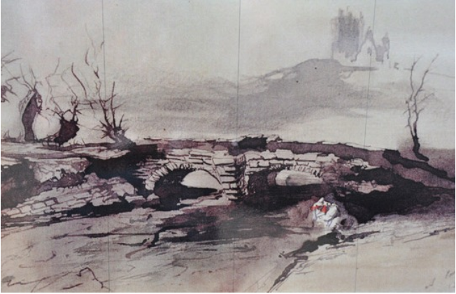 Victor Hugo, Pont de Madeleine (Salmchâteau, 1862)